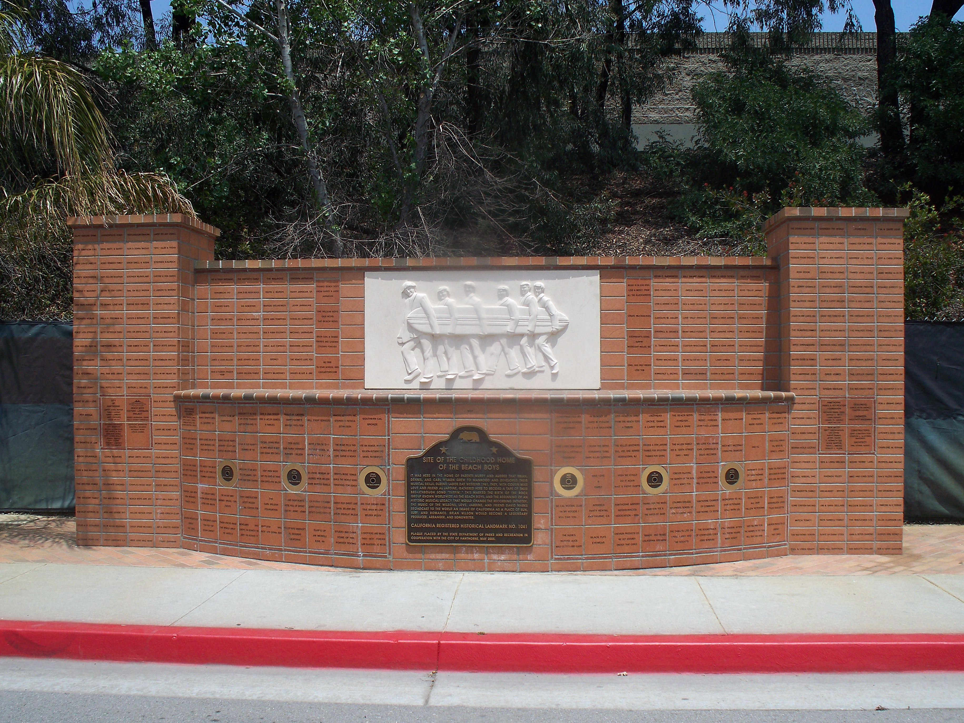 Monumento a los Beach Boys en el lugar donde estaba la casa de los Wilson, autor de la escultura: Harry Jarnagan. (Hawthorne, California, USA.)